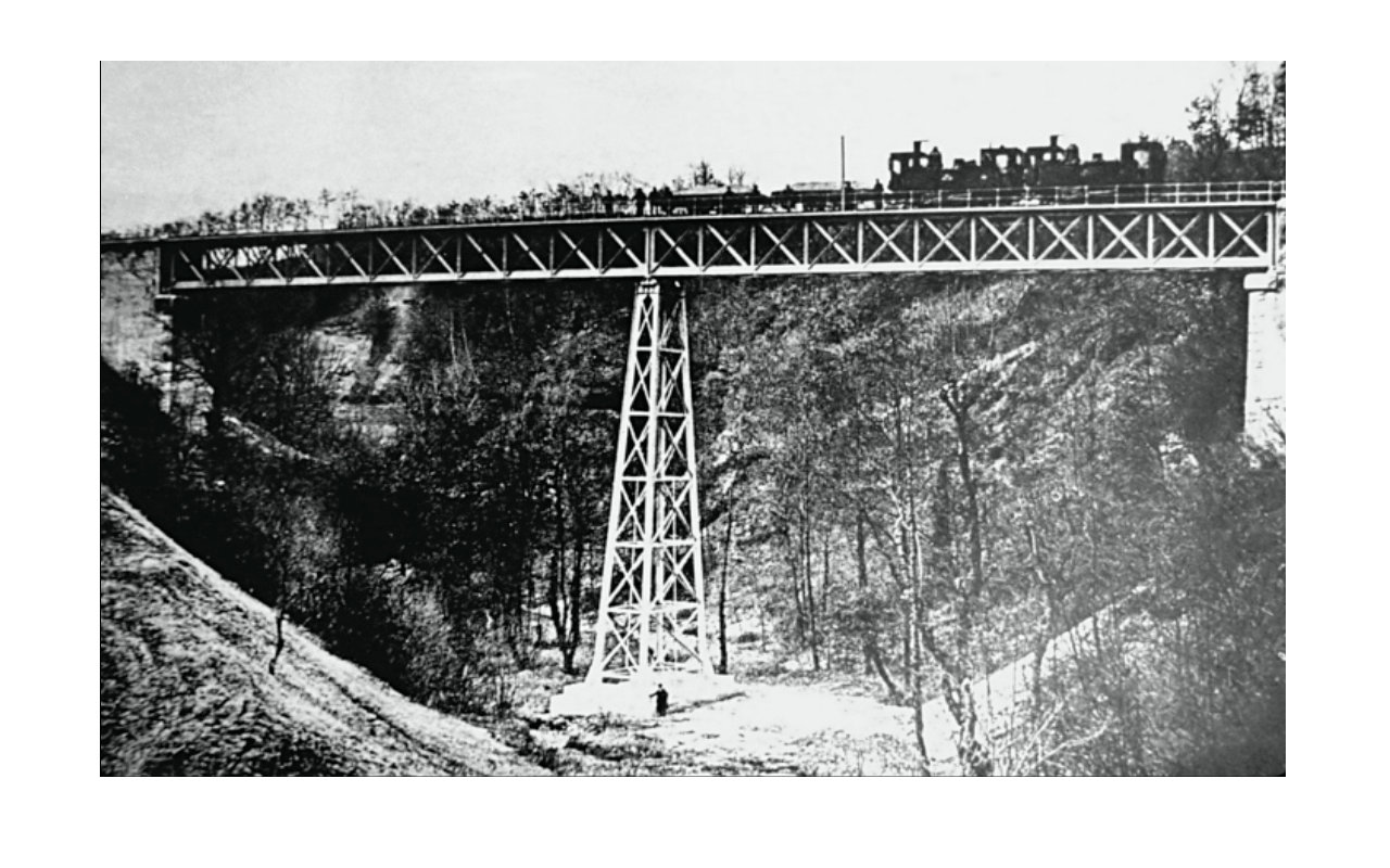 carte postale